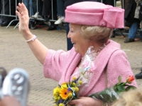 foto van bezoek Beatrix aan Franeker